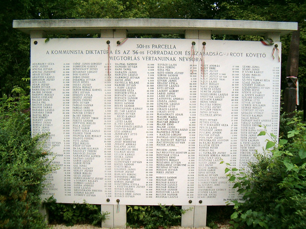 301-es_parcella